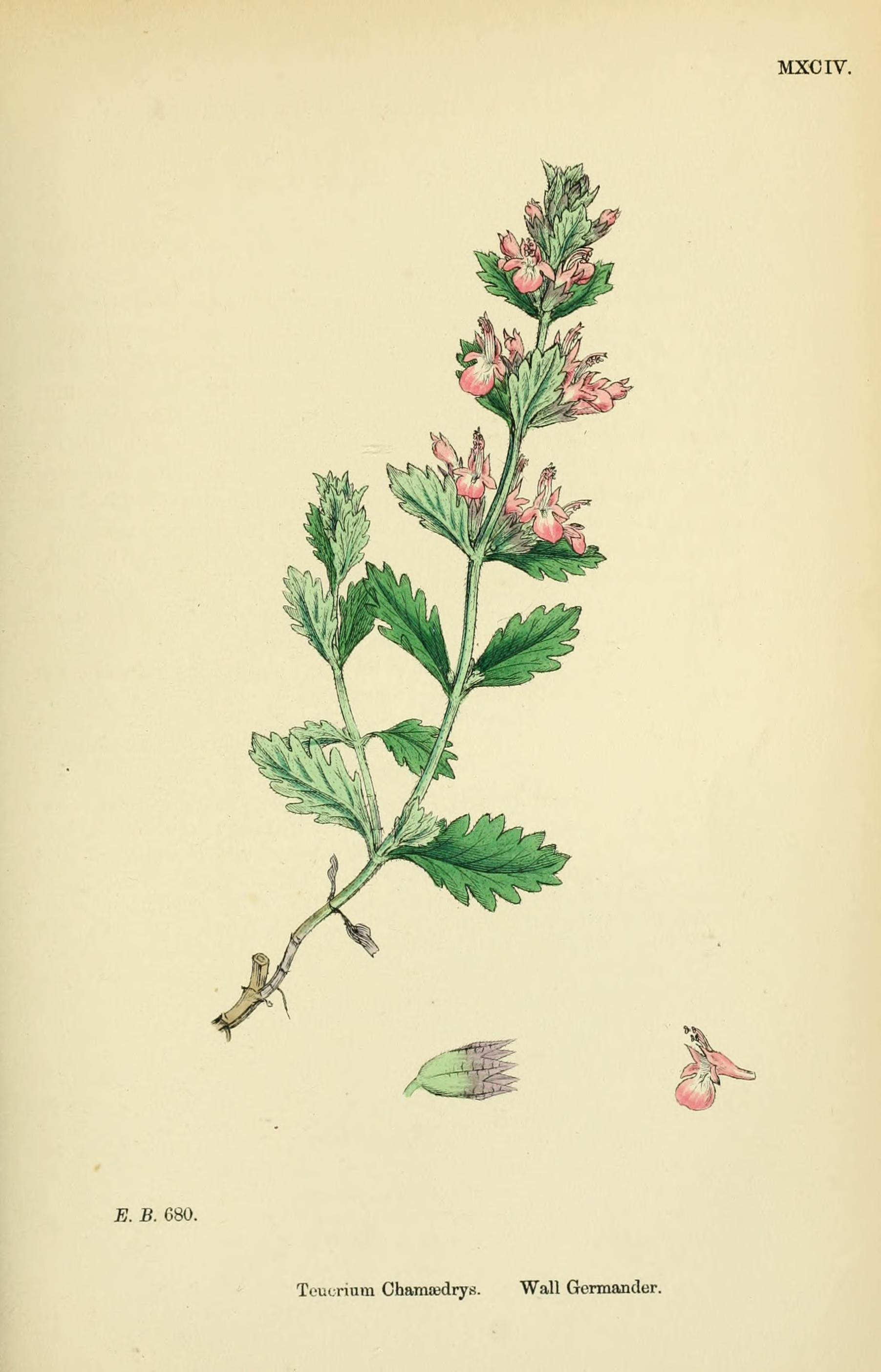 Germandrée petit-chêne